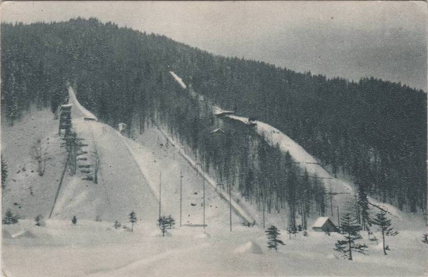 Razglednica Planice.